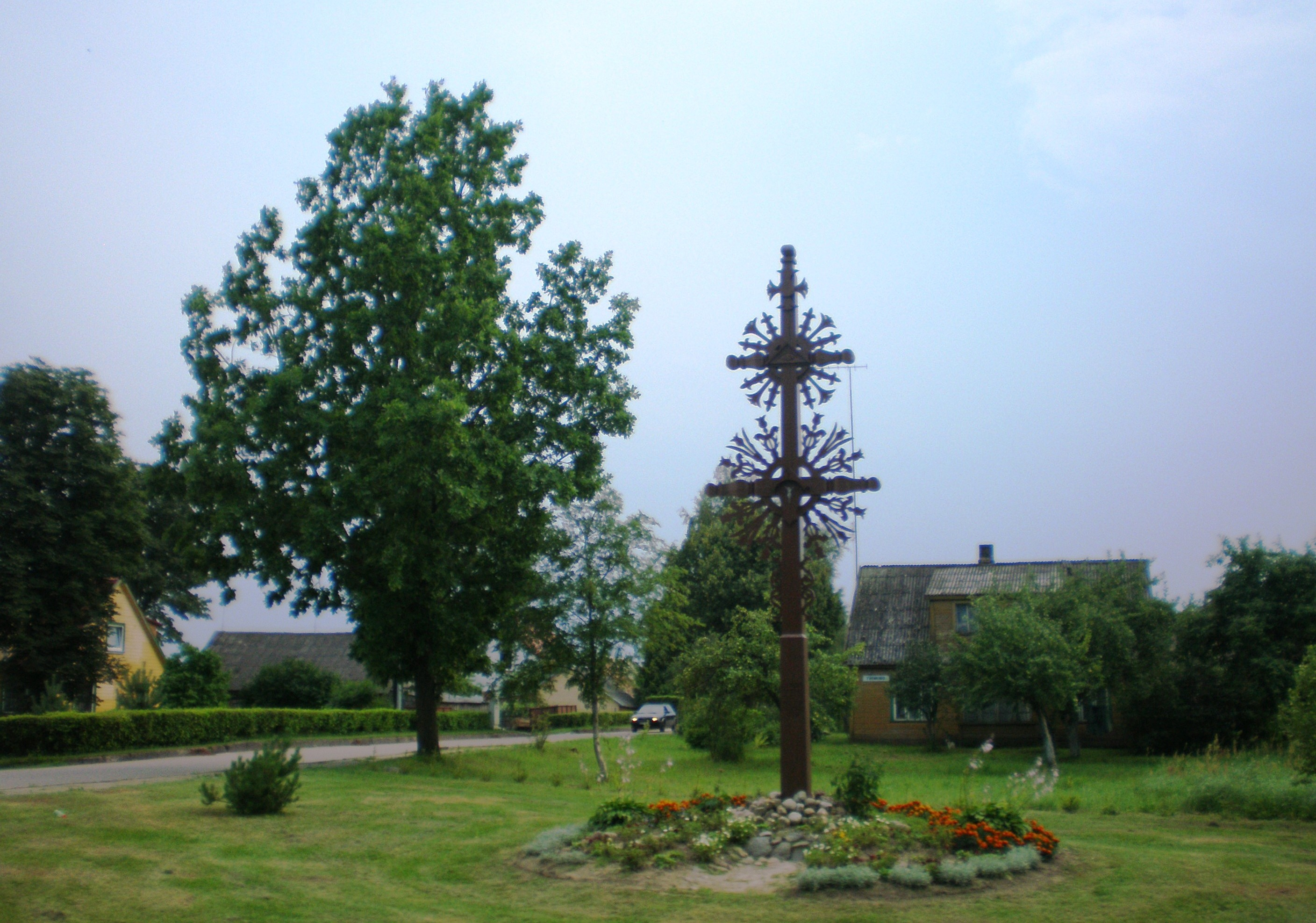 Sujainiai, Raseinių raj.